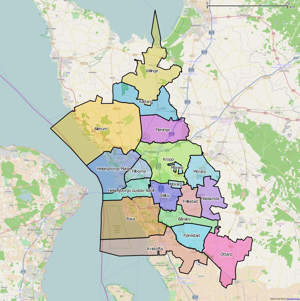 Distriktsindelningen i Helsingborgs kommun world file 72.81118540424864705 0 0 -72.81118540424864705 1383398.75670987786725163 7613213.57515829615294933